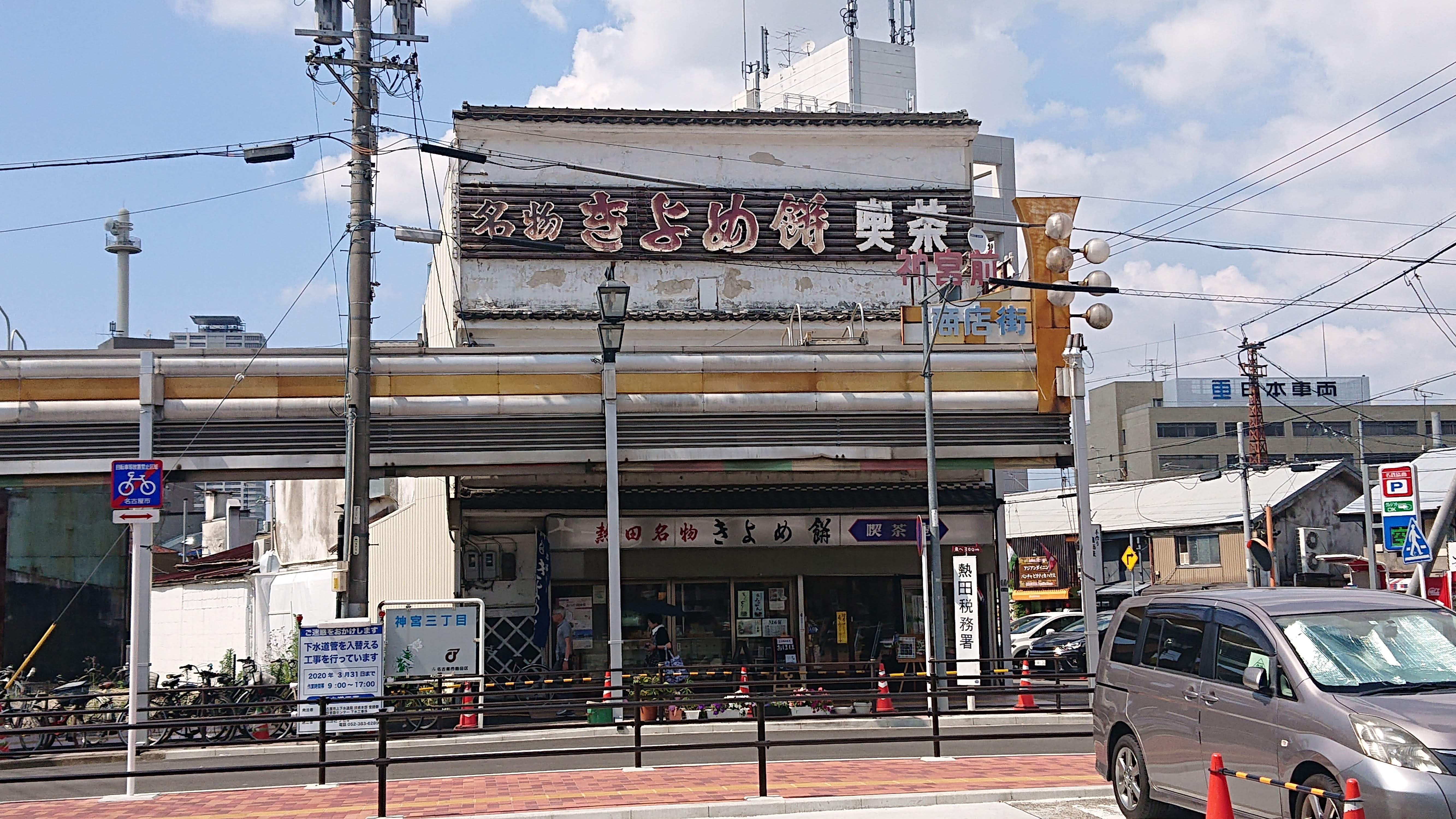 名古屋市熱田区神宮